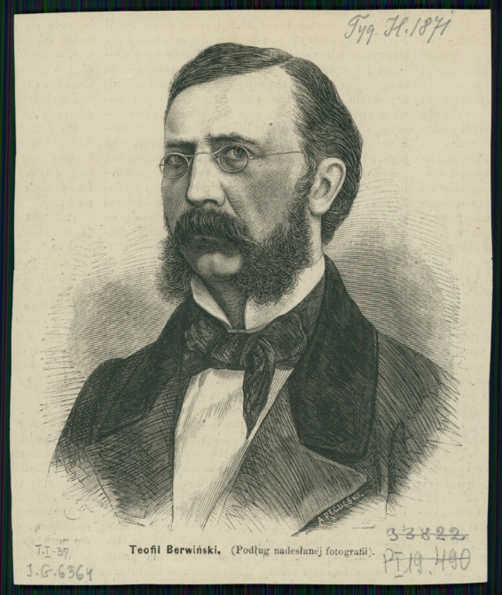 Бервинский, Феофил (1823—1865) — польский историк, педагог.